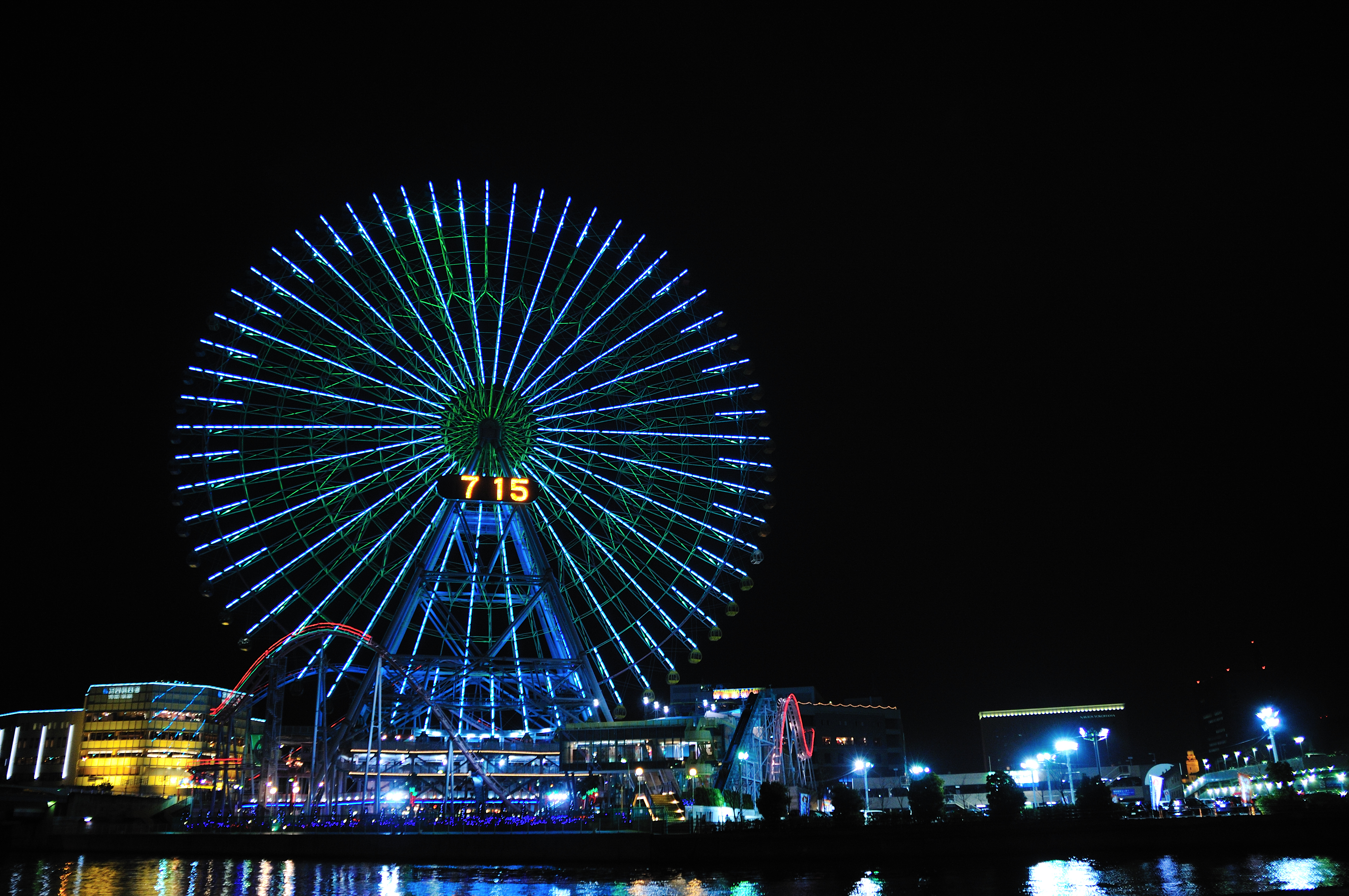 %u6A2A%u6D5C Yokohama_30